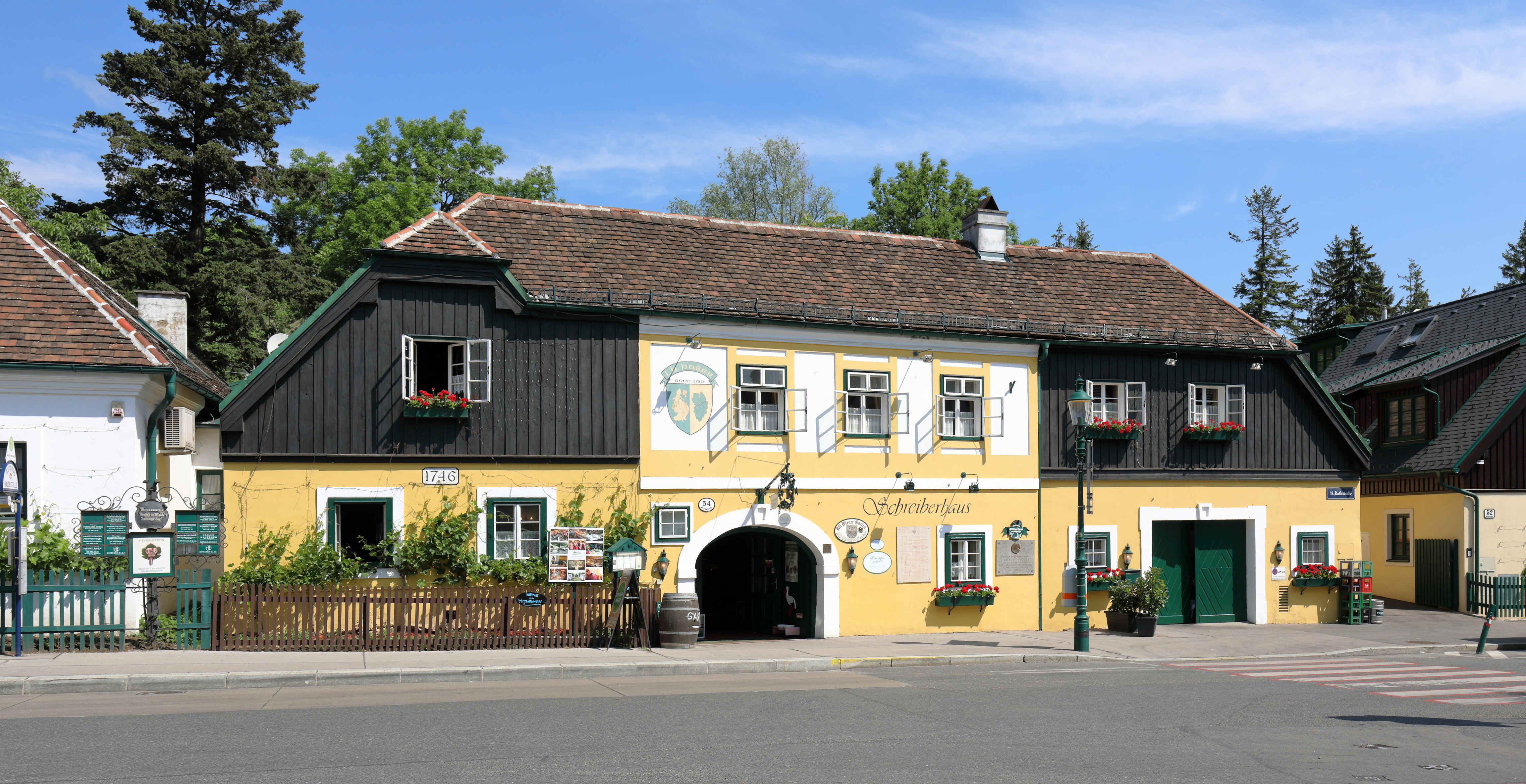 Das denkmalgeschützte Winzerhaus und Heuriger „Schreiberhaus“ in Neustift am Walde, ein Bezirksteil des 19. Wiener Gemeindebezirks Döbling.